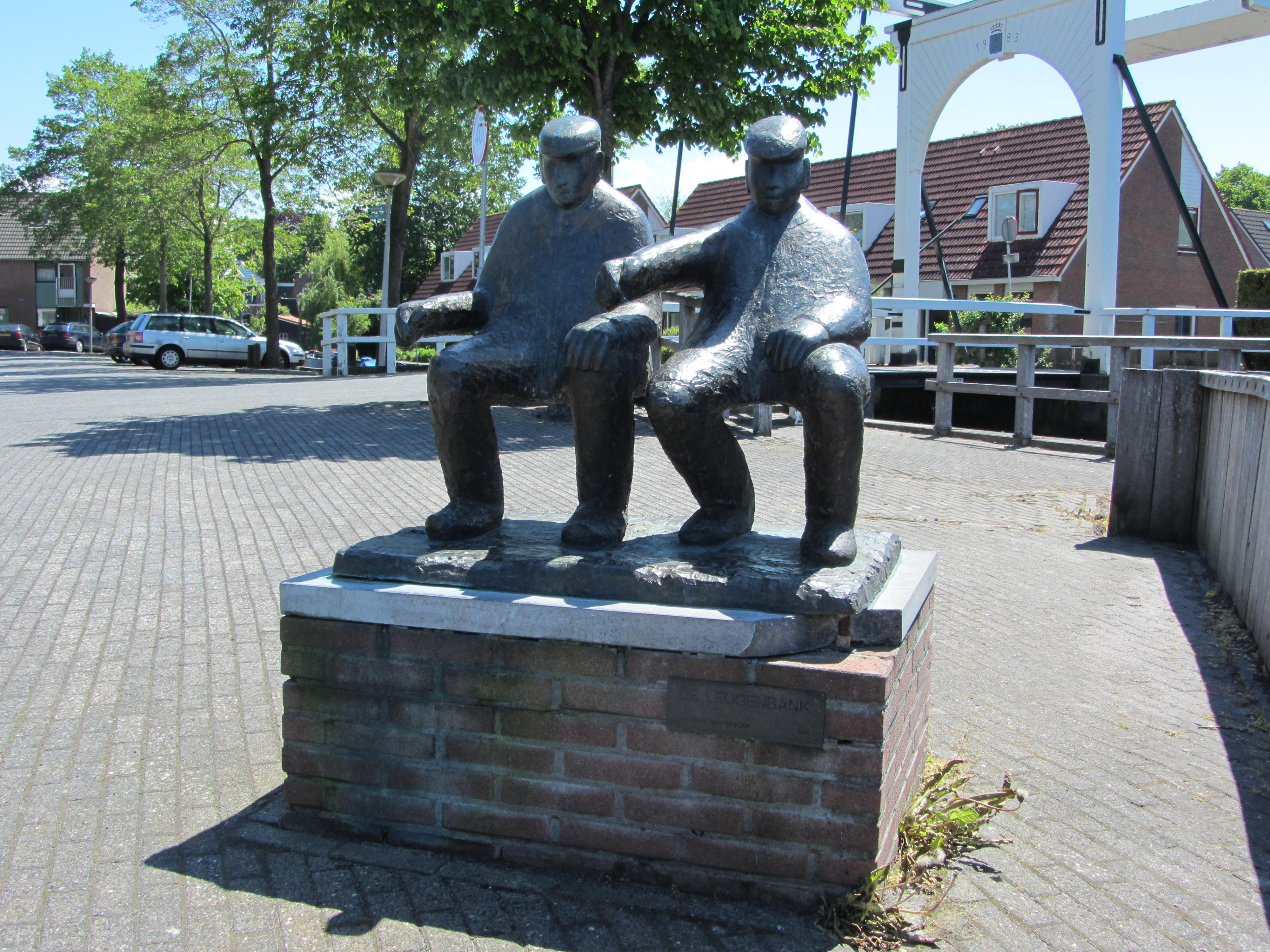 Karianne Krabbendam,1986